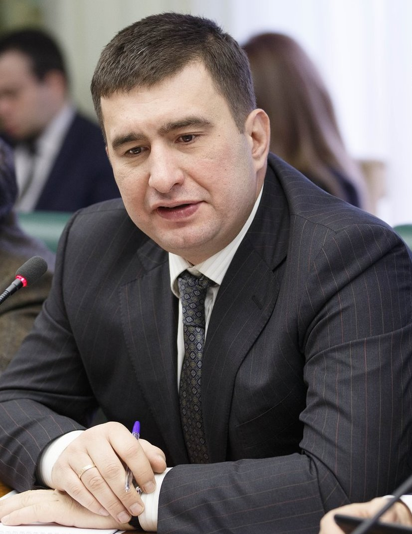 Игорь Олегович Марков (род. 1973) — украинский предприниматель и политик